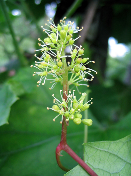 Виноград